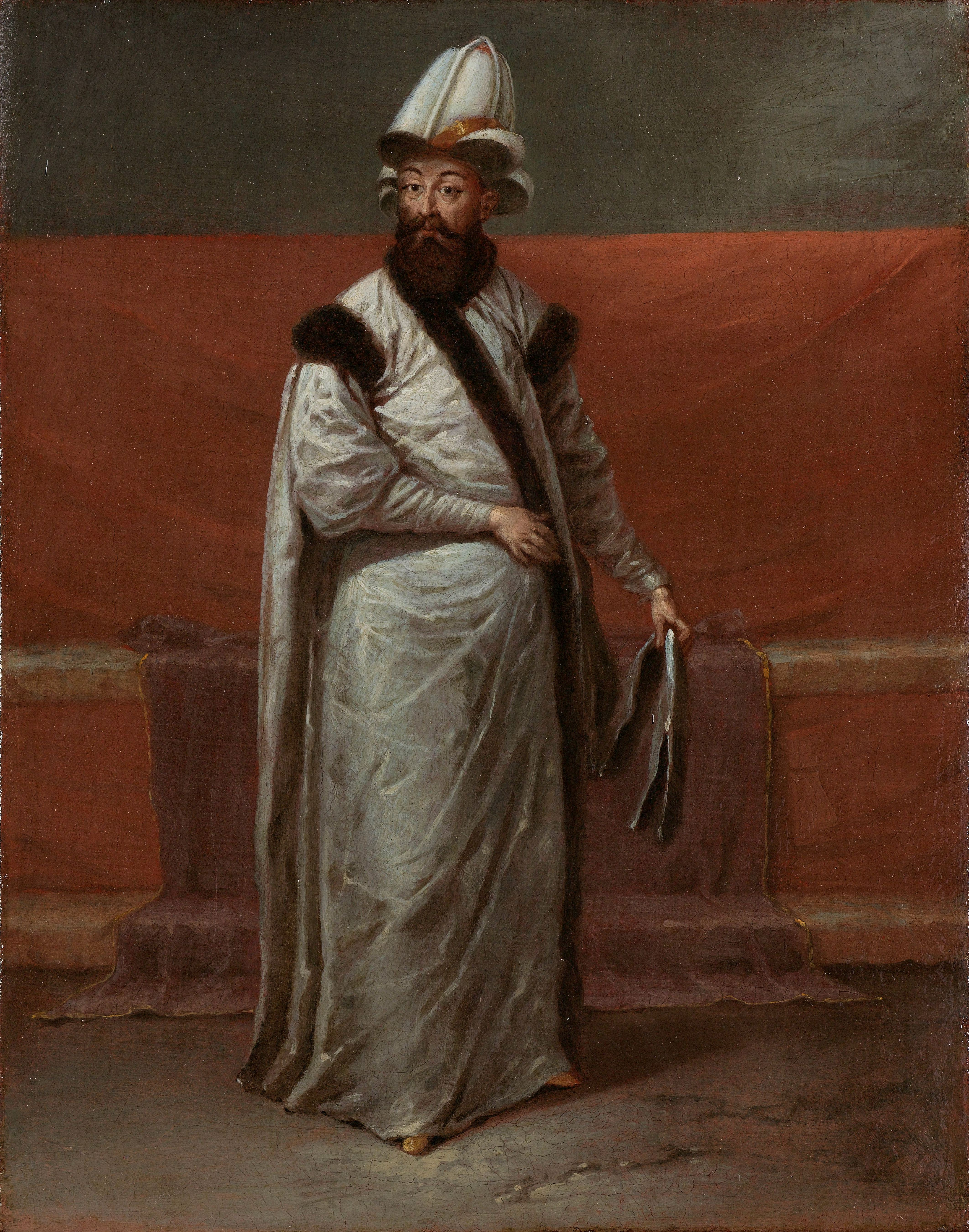 Portret van de grootvizier Nevsehirli Damat Ibrahim Pasa, staande, ten voeten uit. Ǐbrahim Pasha is gekleed in een witte satijnen kaftan gevoerd met sabelbont en een kallâvî, een ceremoniële tulband waar men de vizieren aan kon herkennen. De grootvizier droeg een gouden band over de tulband ter onderscheid van de vizieren, die een zwarte band droegen. Op de achtergrond zien we de sofa of bank die ook op het tweede audiëntieschilderij in de divan is te zien. De grootvizier is door Vanmour geplaatst in een bestuurlijke omgeving, om zijn functie te onderstrepen. Collection: schilderijen; Vanmour serie; Jean Baptiste Vanmour (1671-1737), olieverf op doek, ca. 1727-1730